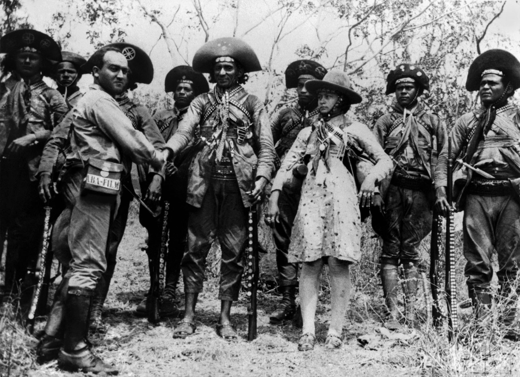 Retratos do cangaço - O encontro de Abrahão com o bando de Virgulino, em foto tirada pelo cangaceiro Juriti. Da esquerda para a direita: Vila Nova, não identificado, Luís Pedro, Benjamin Abrahão (à frente), Amoroso, Lampião, Cacheado (ao fundo), Maria Bonita, não identificado, Quinta-Feira